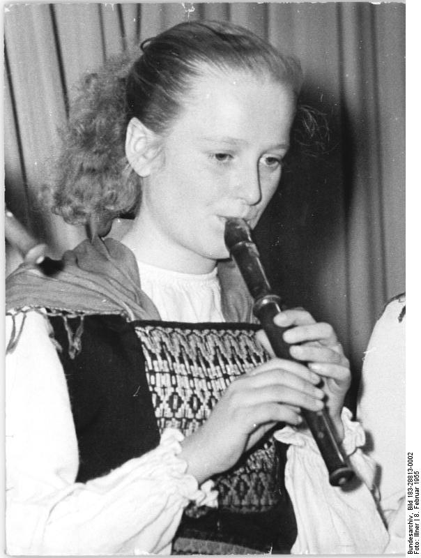 Leipzig, Auftritt der Dorfkulturgruppe aus Rethwisch Zentralbild Illner Wjt-Qu. 12 Mot. 8.2.1955 Arbeitstagung über die Verbesserung der Volkskunstarbeit auf dem Lande. In Leipzig fand am 5. und 6. Februar 1955 eine Arbeitstagung des Ministeriums für Kultur mit über 300 Leitern der Volkskunstgruppen aus ländlichen Gebieten der DDR und Kulturfunktionären der Bezirke und Kreise statt. Gute Volkskunstgruppen aus den ländlichen Gebieten zeigten Ausschnitte ihrer Arbeit. Auftreten der Dorfkulturgruppe aus Rethwisch-Mecklenbg. UBz: Junge Blockflötenspielerin der Volksinstrumentengruppe.